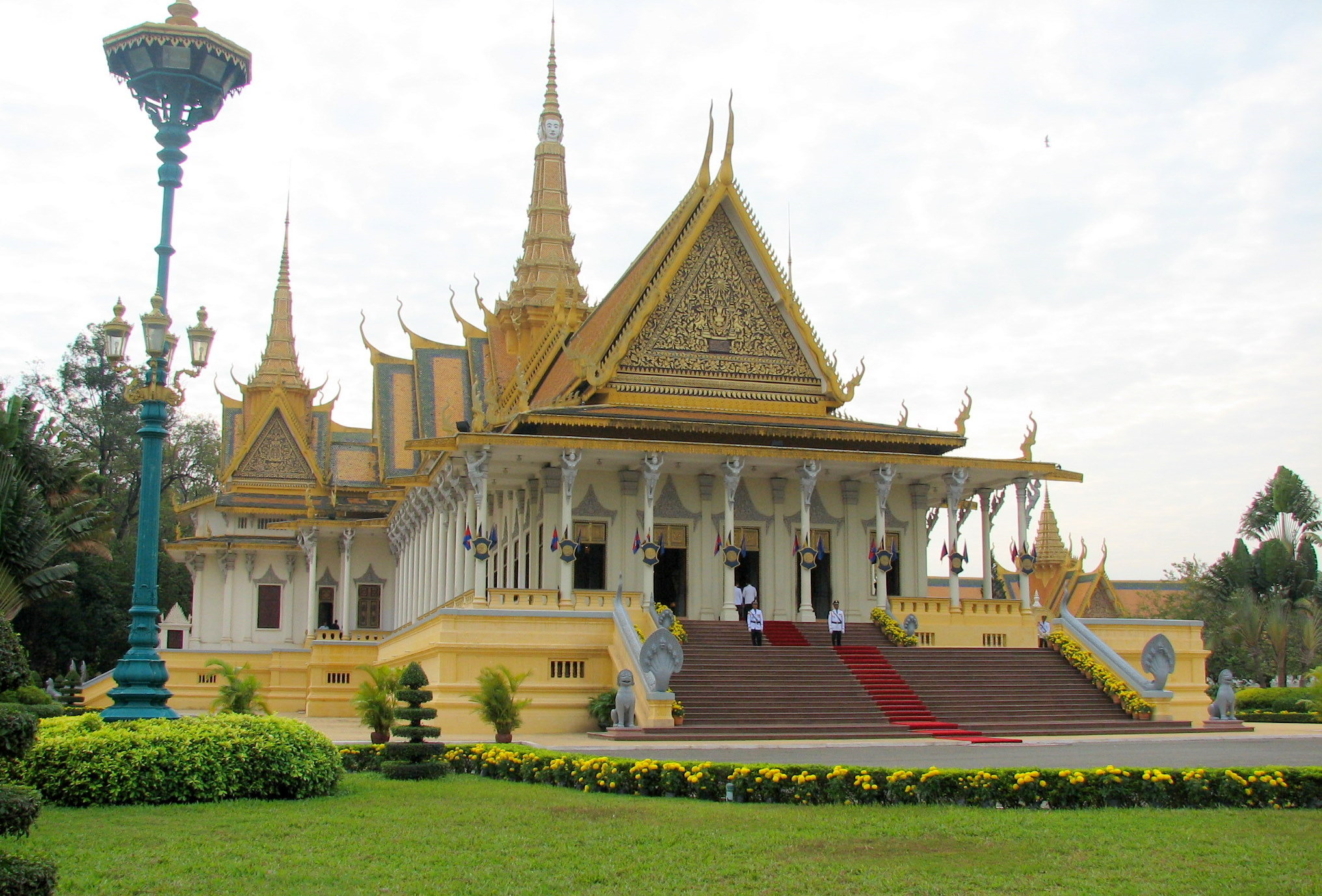 Royal Palace including gardens and tombs in pagoda, Phnom Penh Cambodia הארמון המלכותי שעיר פנום פן בירת קמבודיה. הארמון נמצא במתחם סגור הכולל מבנים רבים גנים ופגודות שהינם קברים של בני המשפחה המלכותית